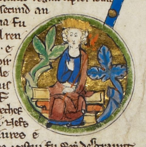 Miniature de Harthacnut dans une généalogie royale du XIIIe siècle.